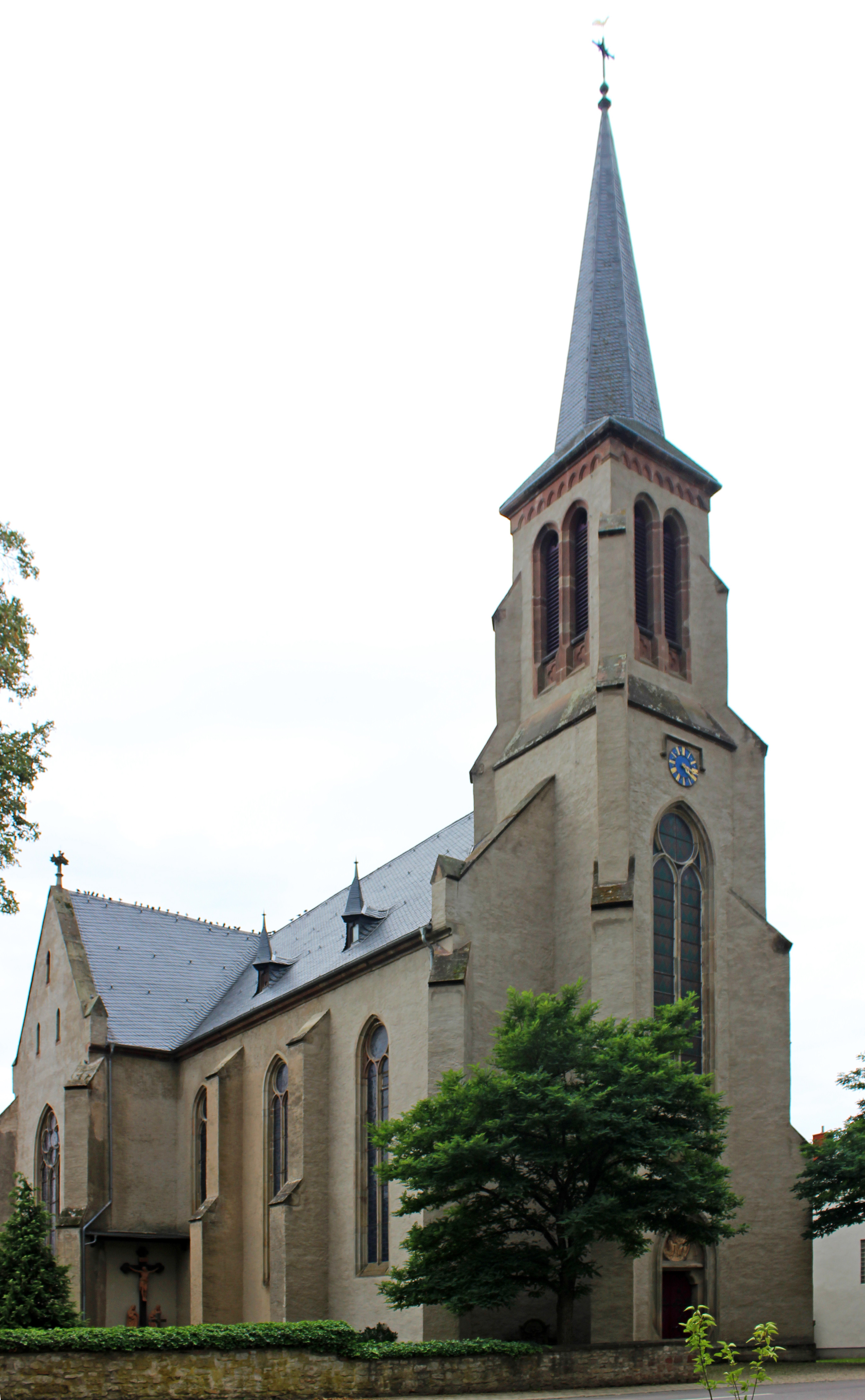 Die katholische Pfarrkirche St. Rufus in Niedaltdorf, Gemeinde Rehlingen-Siersburg, Landkreis Saarlouis, Saarland.